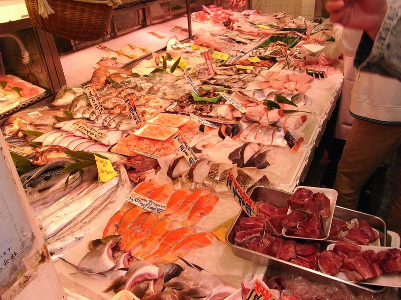 渋谷区笹塚 鮮魚店